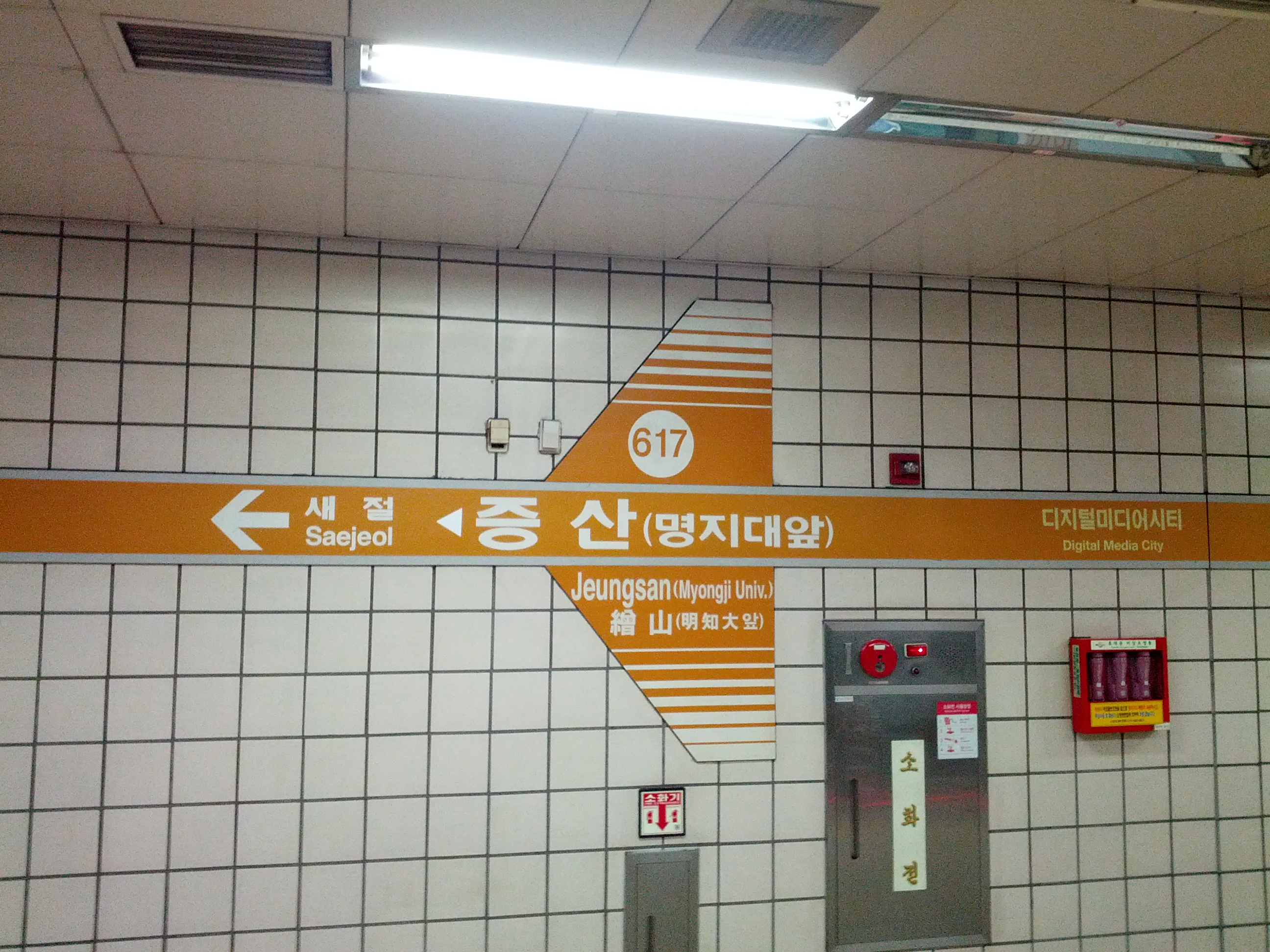 증산역 역명판